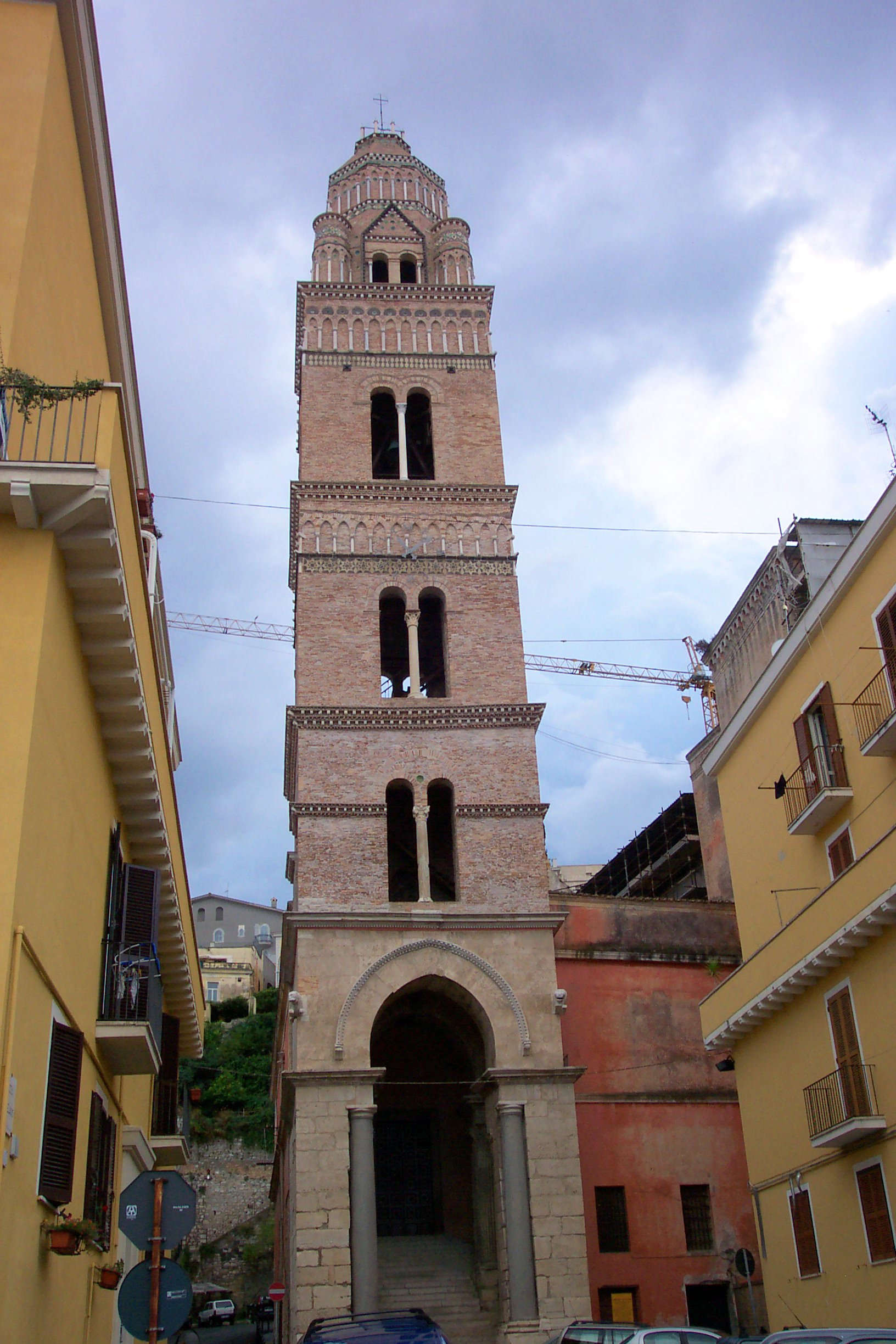 Gaeta, Lazio, Italy